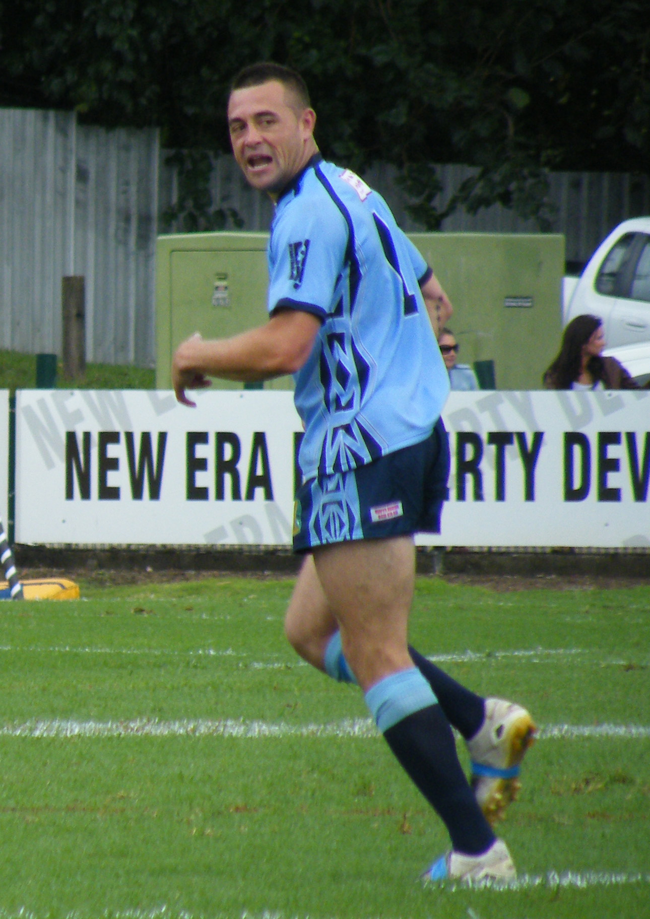 Cabramatta Nines 2010